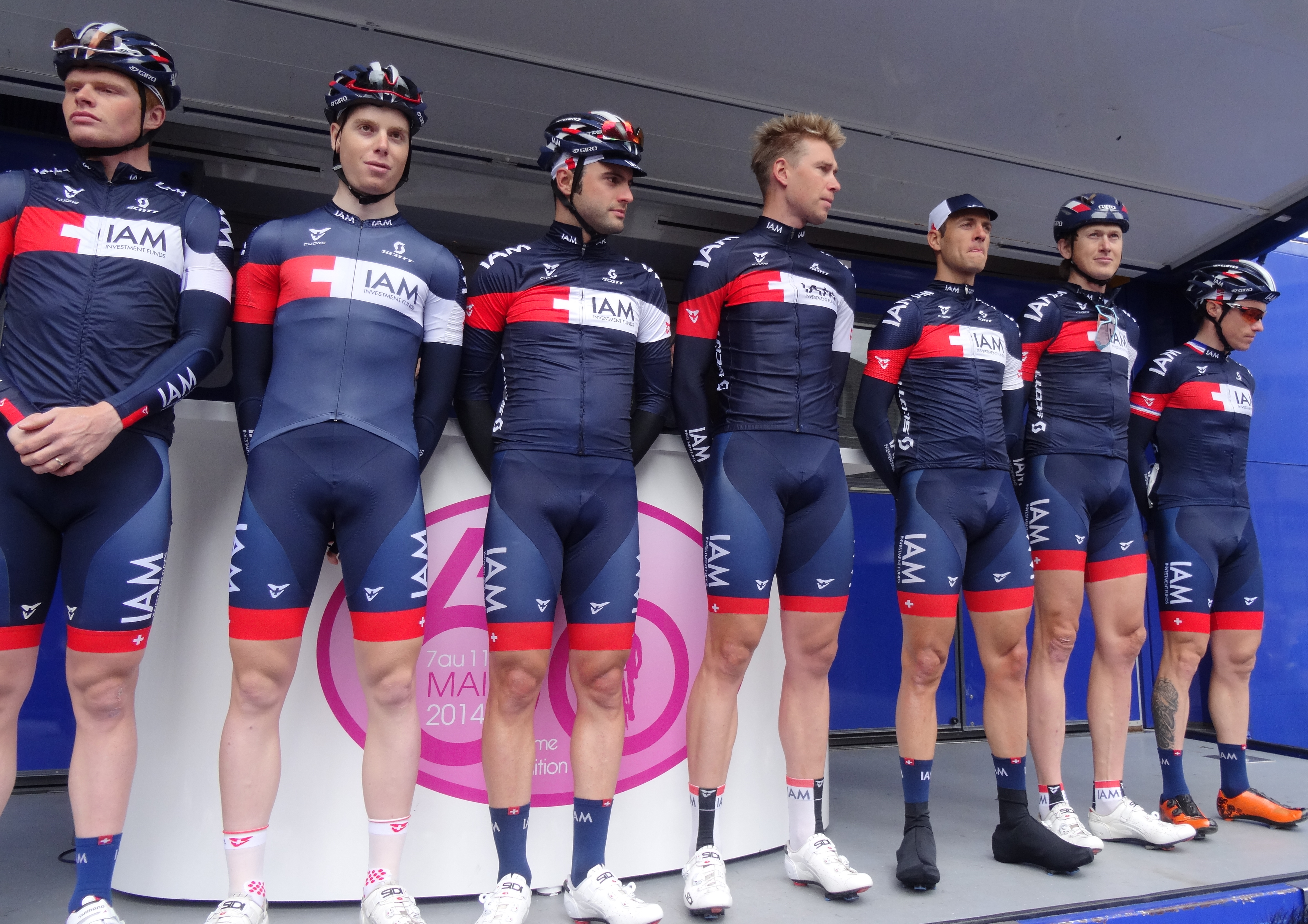 Reportage photographique réalisé le mercredi 7 mai 2014 au départ de la première étape de l'édition 2014 des Quatre jours de Dunkerque à Dunkerque, Nord, Nord-Pas-de-Calais, France. Depicted people: Dominic Klemme, Marcel Aregger, Matteo Pelucchi, Roger Kluge, Kevyn Ista, Gustav Erik Larsson and Sylvain Chavanel Depicted team: IAM